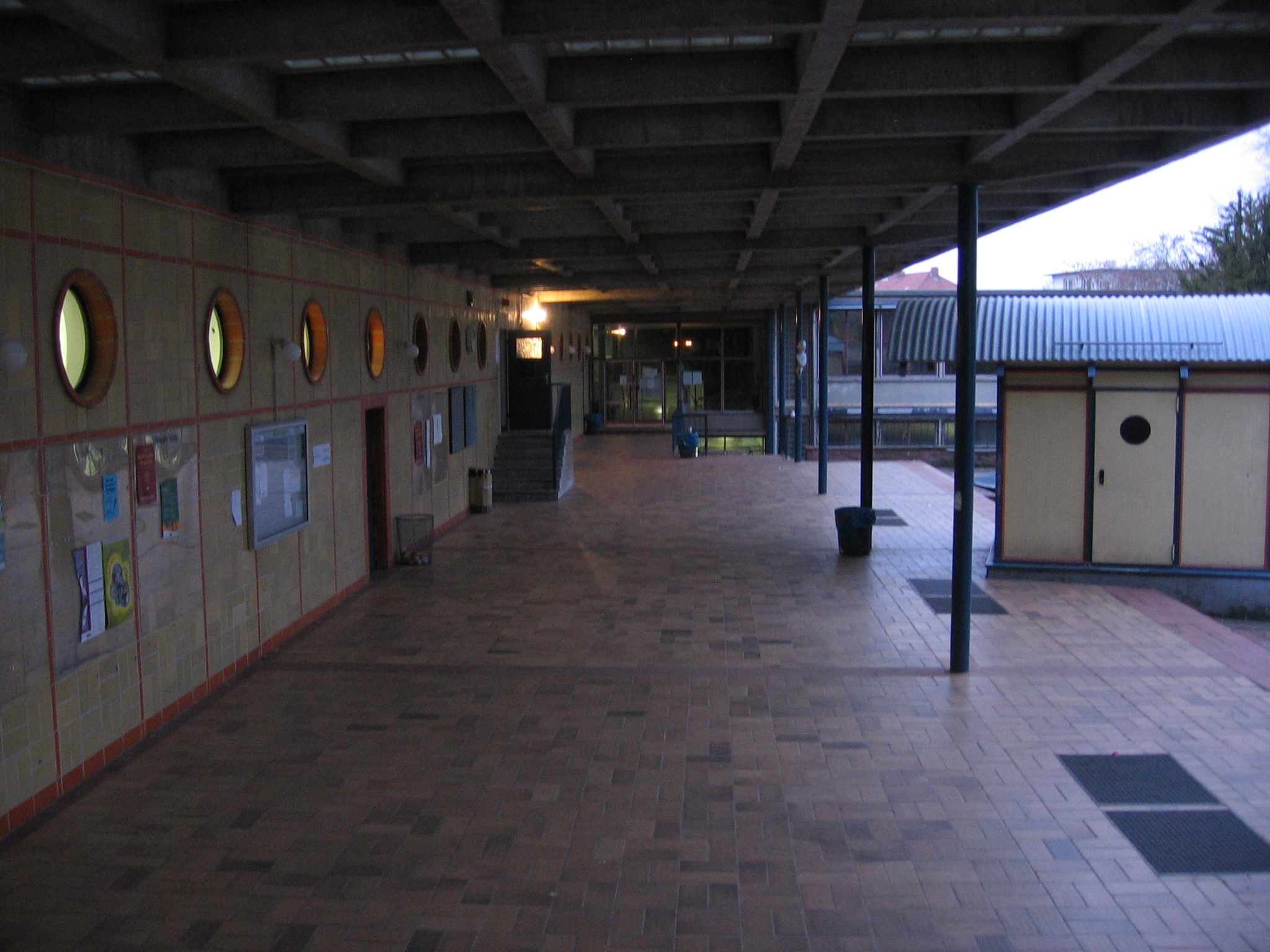 Ludwig-Georgs-Gymnasium in Darmstadt. Pausenhalle von innen mit Renovierten Dach.